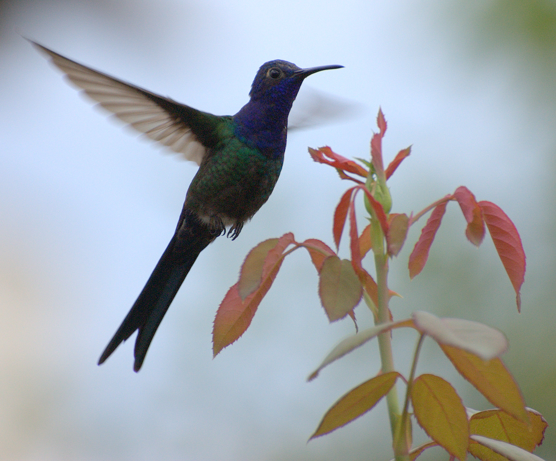 No quintal da casa dos meus pais na cidade de Piraju-SP